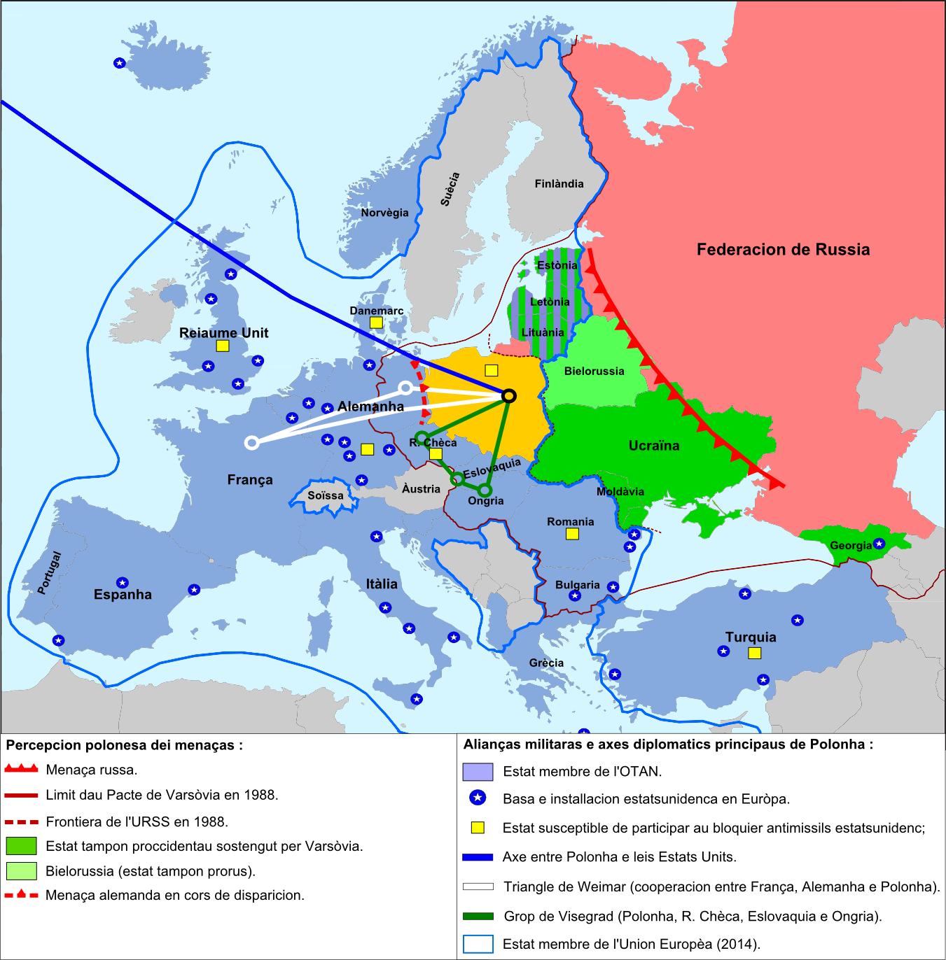 Esquèma generau de la diplomacia polonesa (2014).